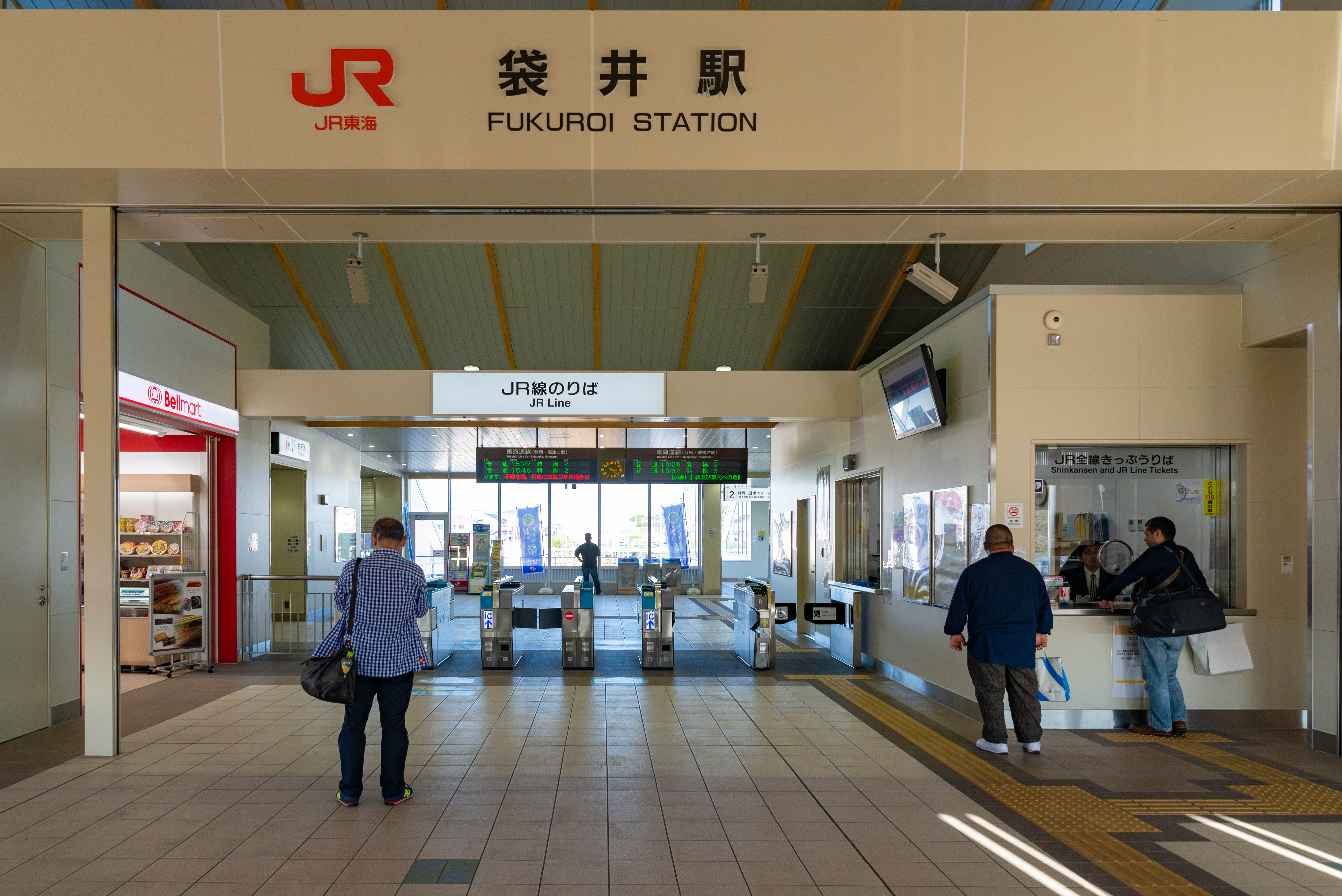 東海旅客鉄道株式会社東海道本線袋井駅改札